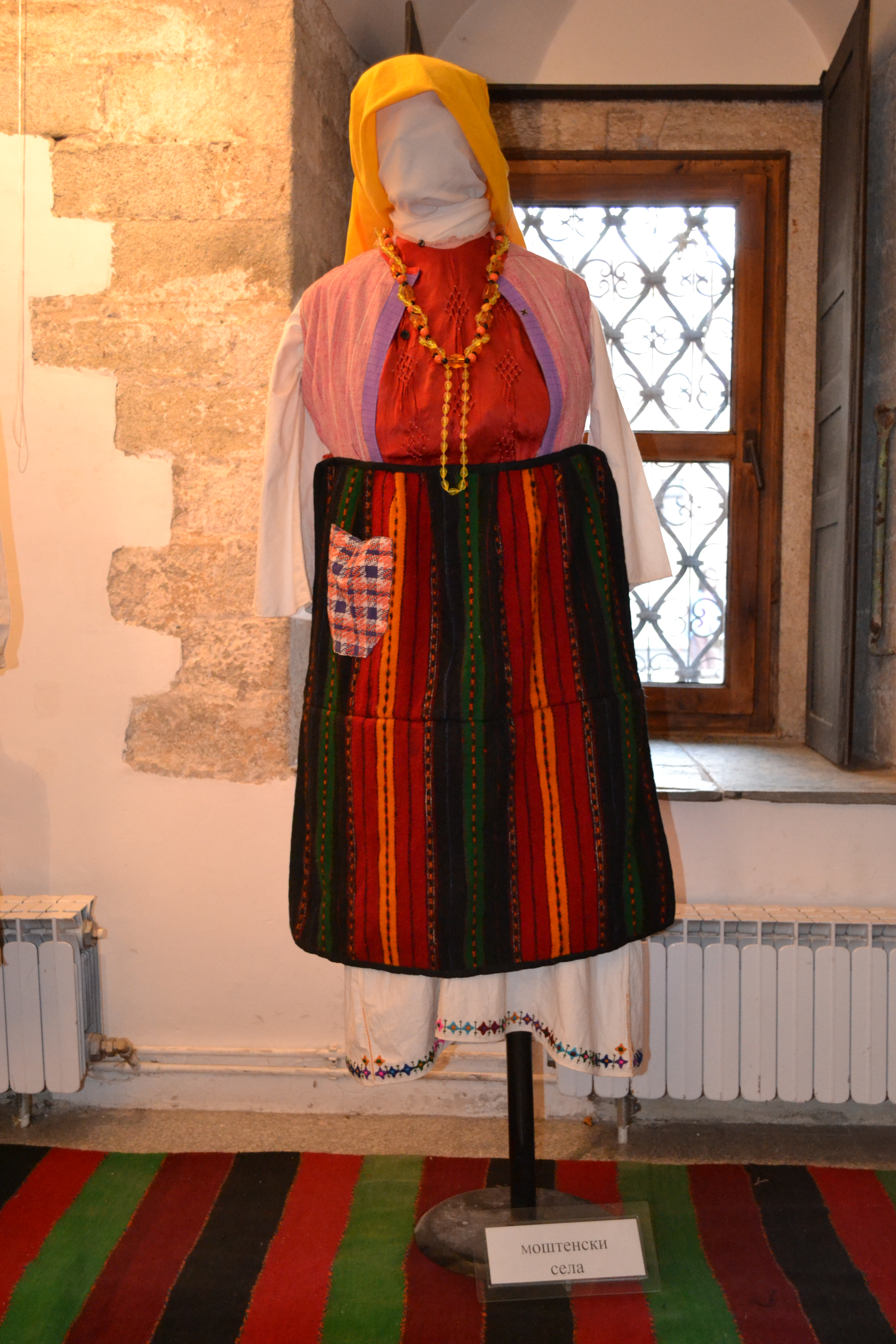 Моштенска носија